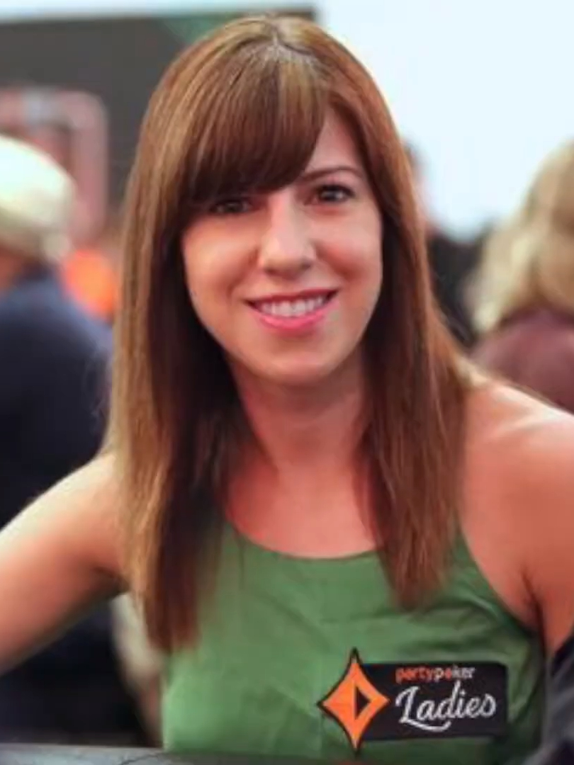 Kristen Bicknell beim Caribbean Poker Party Festival